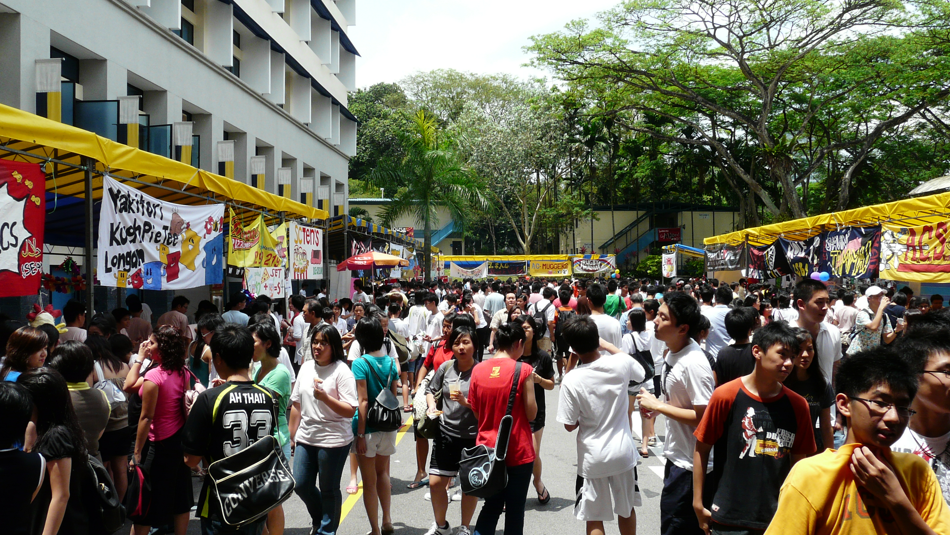 ACJC fun o rama